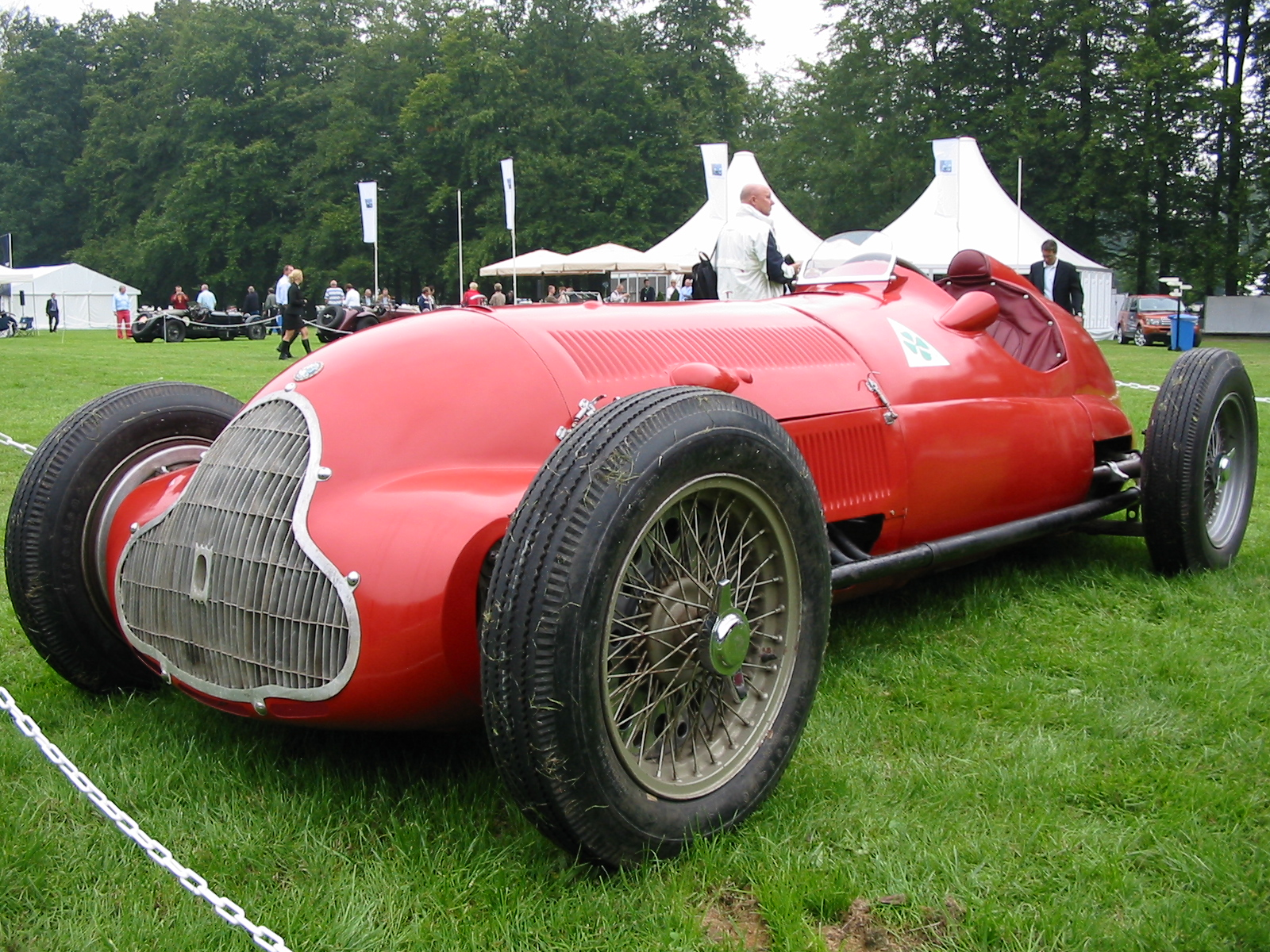 Template:En1=Alfa Romeo 12C, 1937